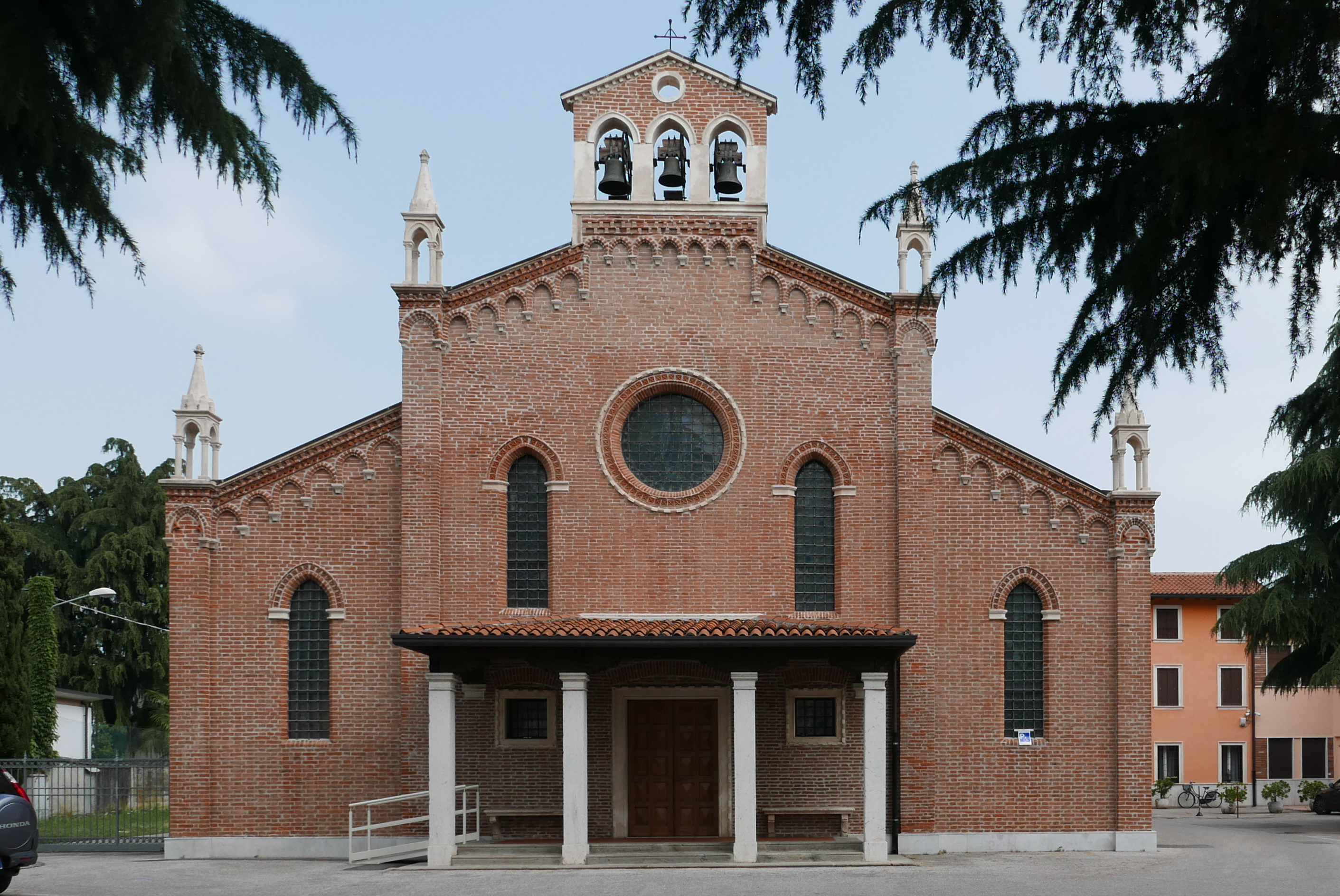 Chiesa della Madonna del Rosario, ad Anconetta